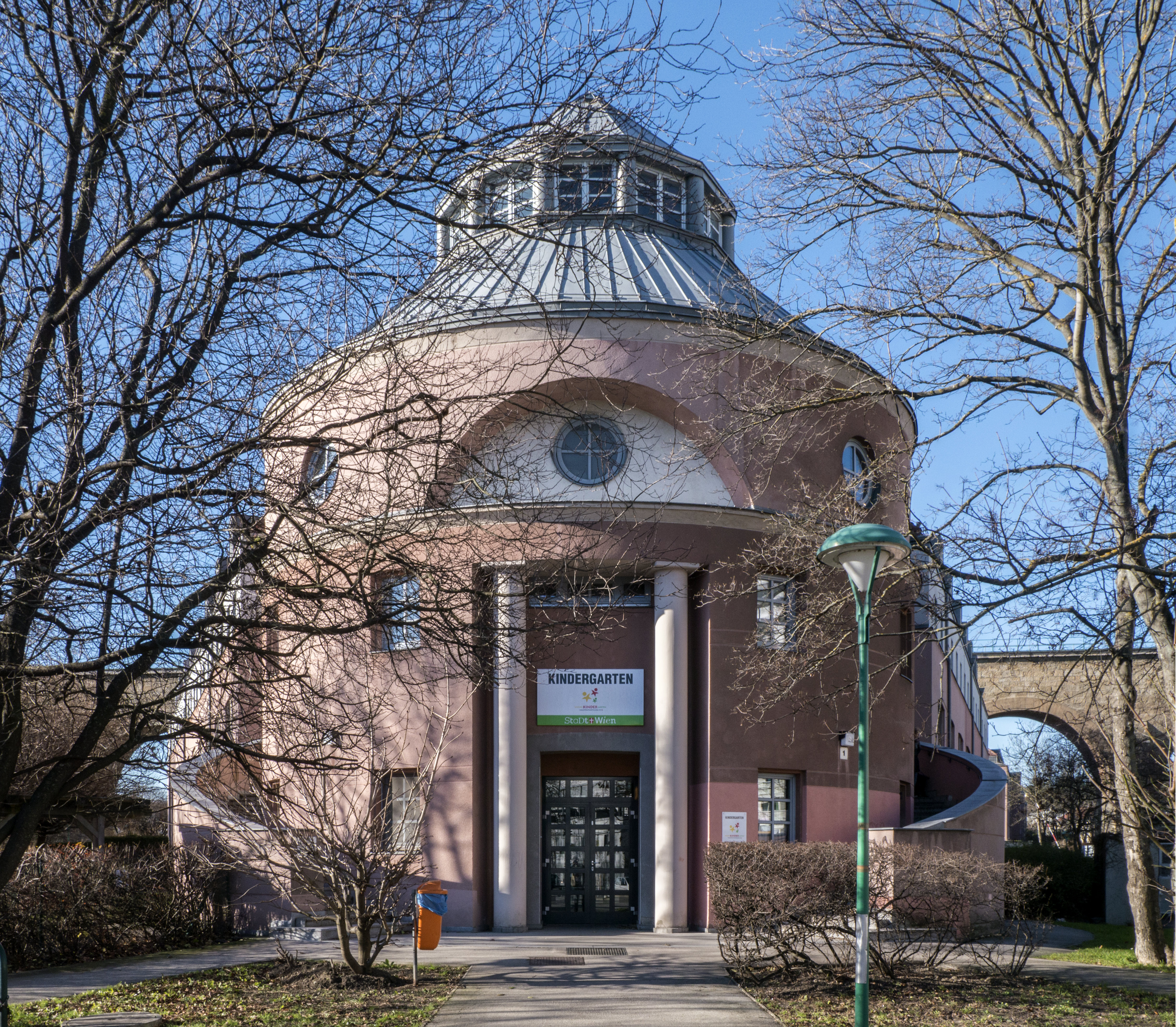 Kommunaler postmoderner Wohnbau, Postmoderne Anlage von Krier, Wachberger, Gebhart